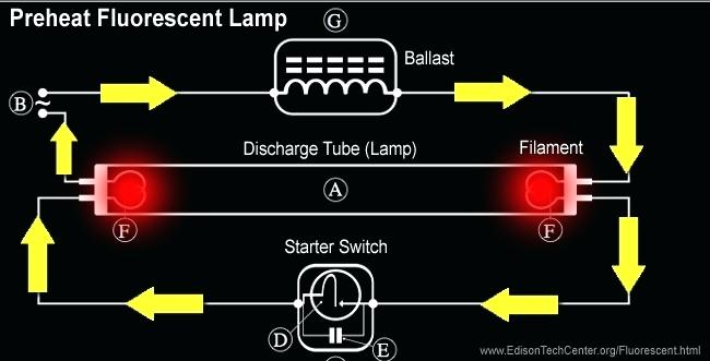 မြန်မာဘာသာ: မီးချောင်း